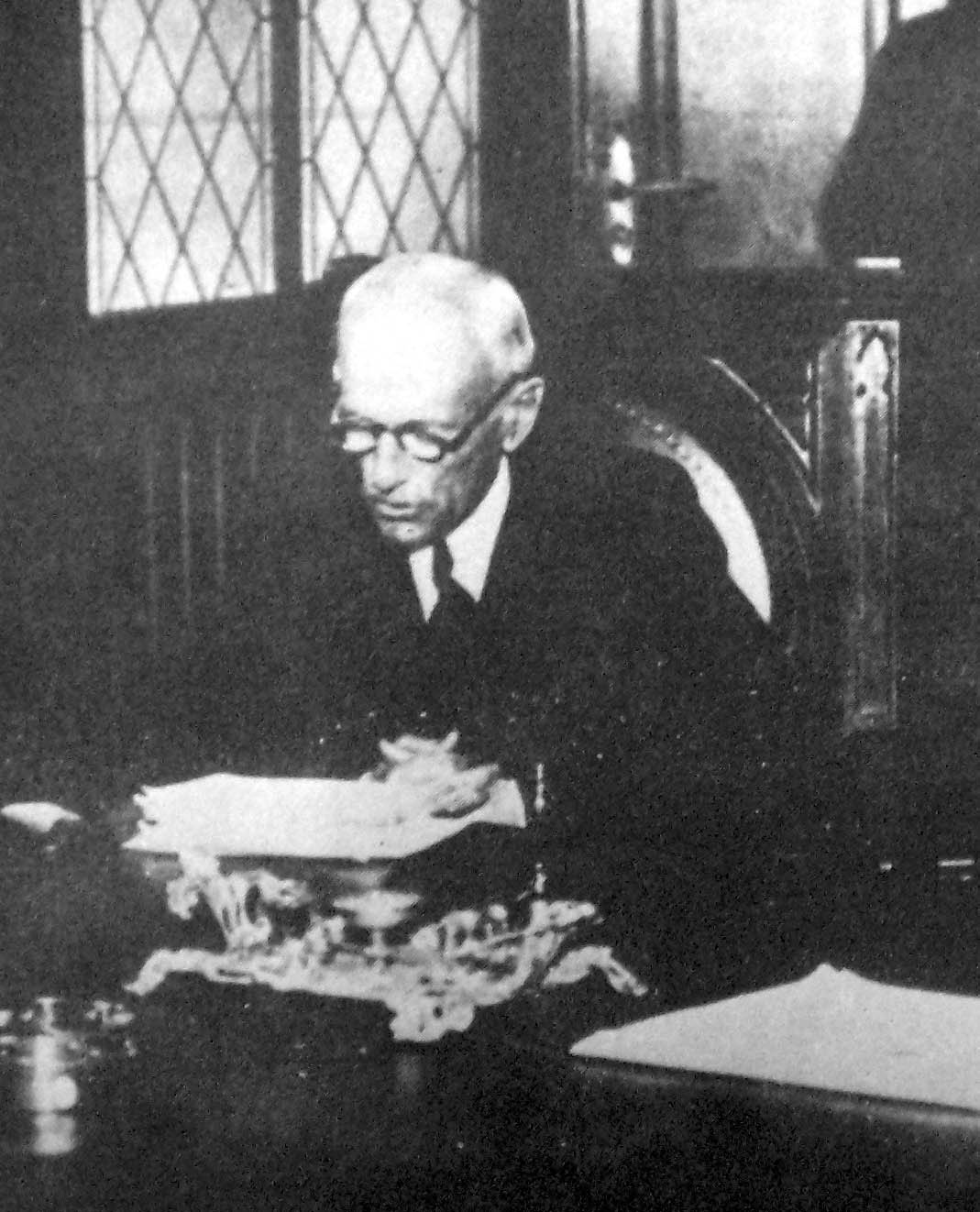 Ernesto Bosch (1863-1951), un abogado y político argentino.